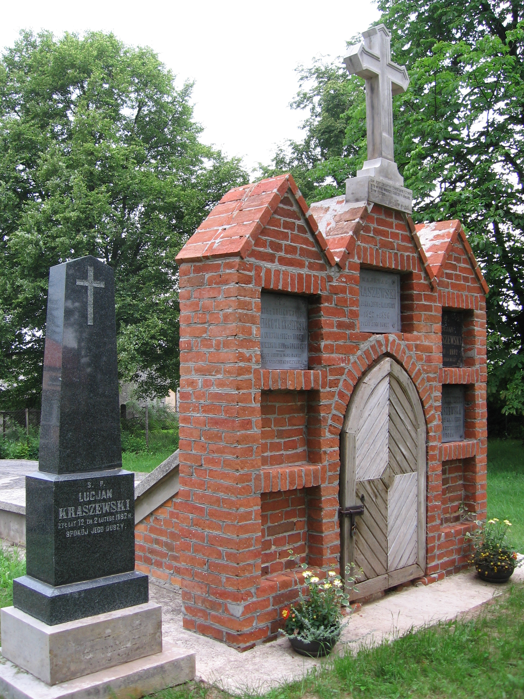 Сямейны склеп Крашэўскіх у Вішніцах, дзе пахаваны Каэтан і Люцыян Крашэўскія